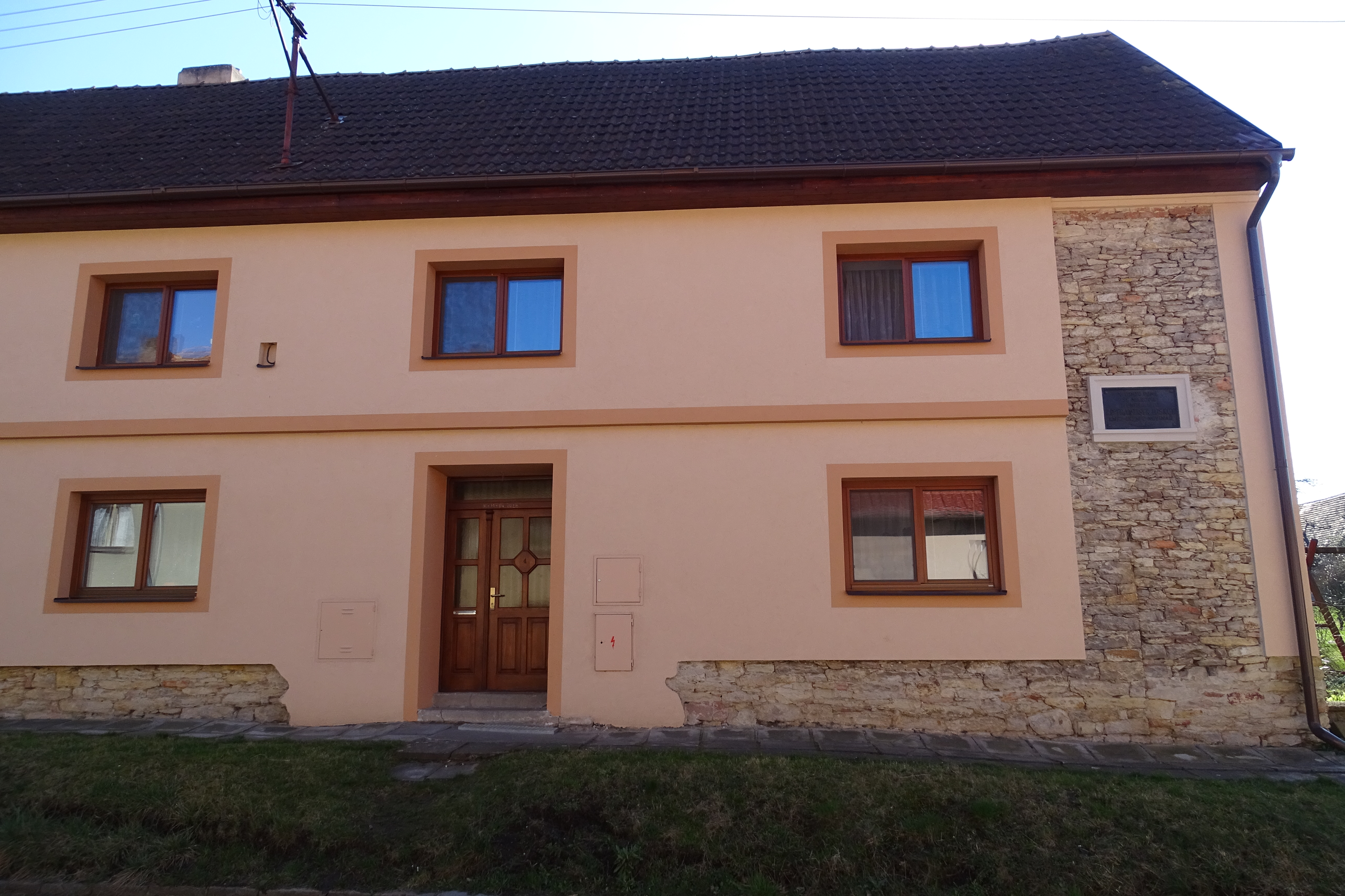 rodný dům